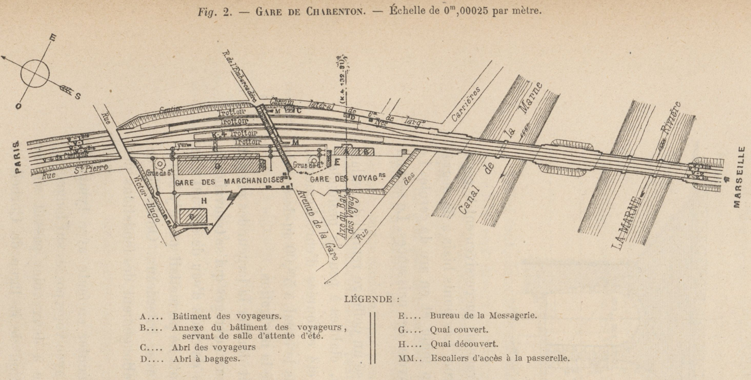 Plan de la gare de Charenton en 1887 après le quadruplement des voies, publié dans la Revue générale des chemins de fer.